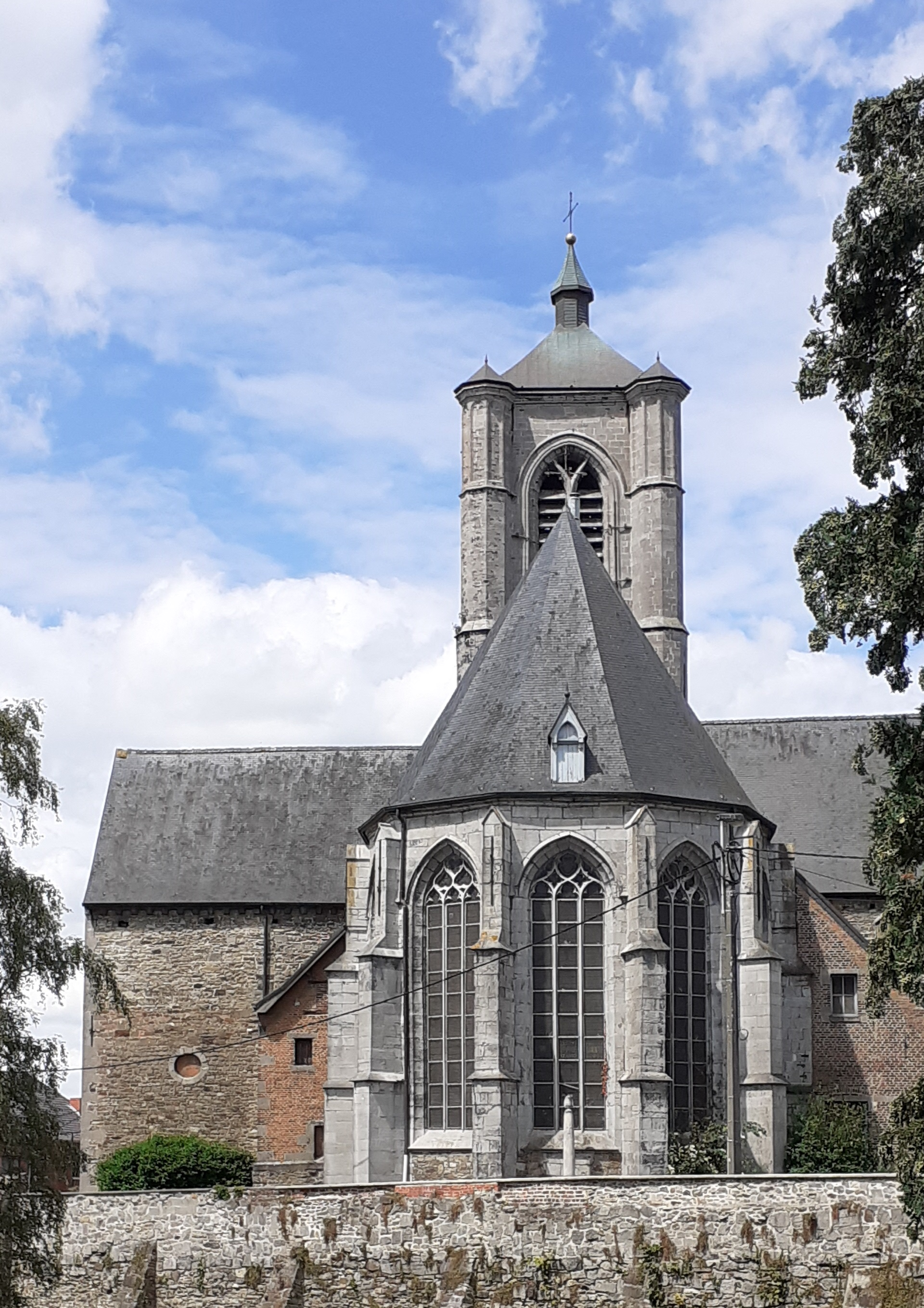 Vue sur le chœur de l'église et à l'avant-plan le mur de clôture de l'ancien rempart.